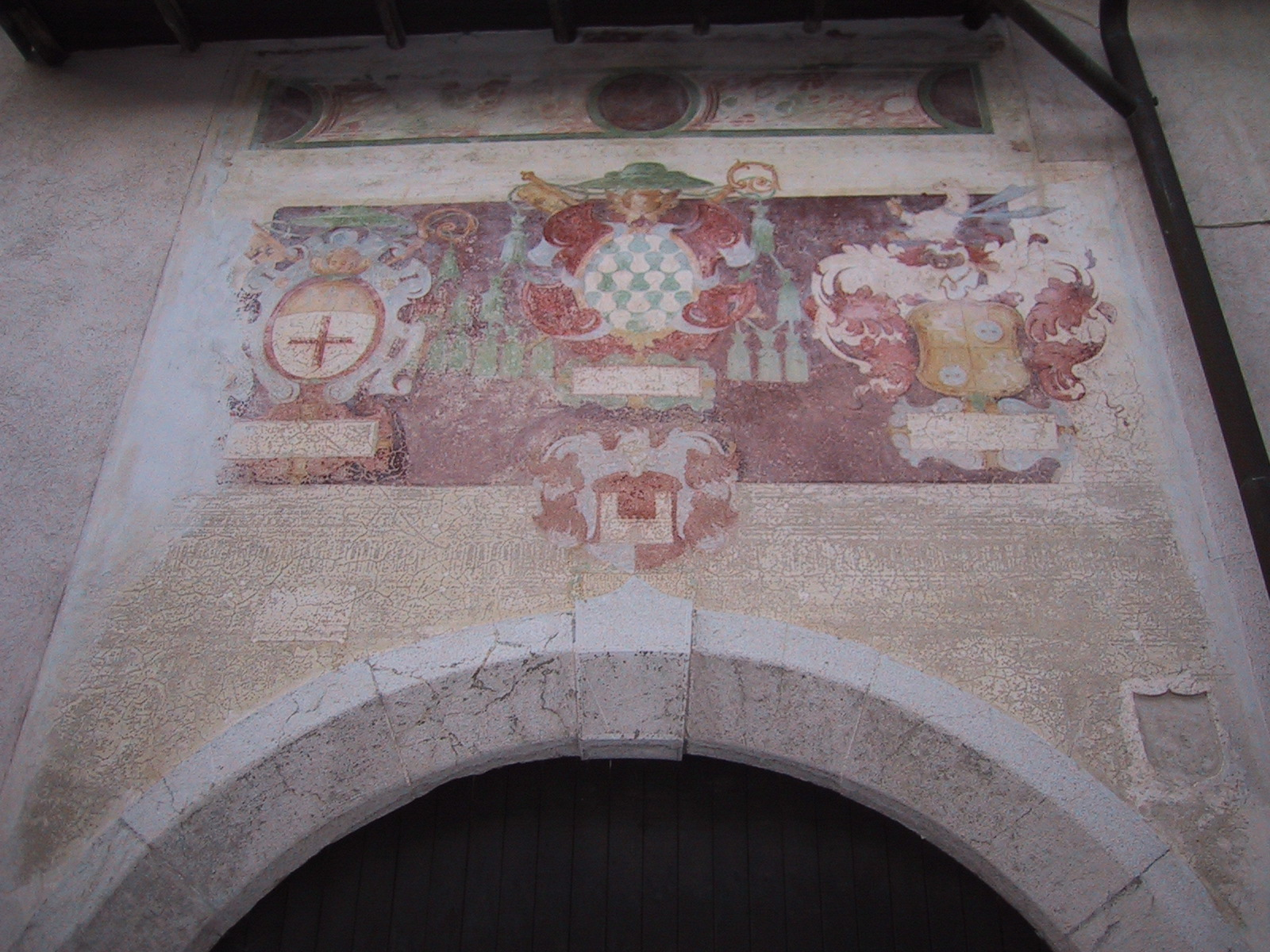 Aufnahme aus Meride TI, Schweiz